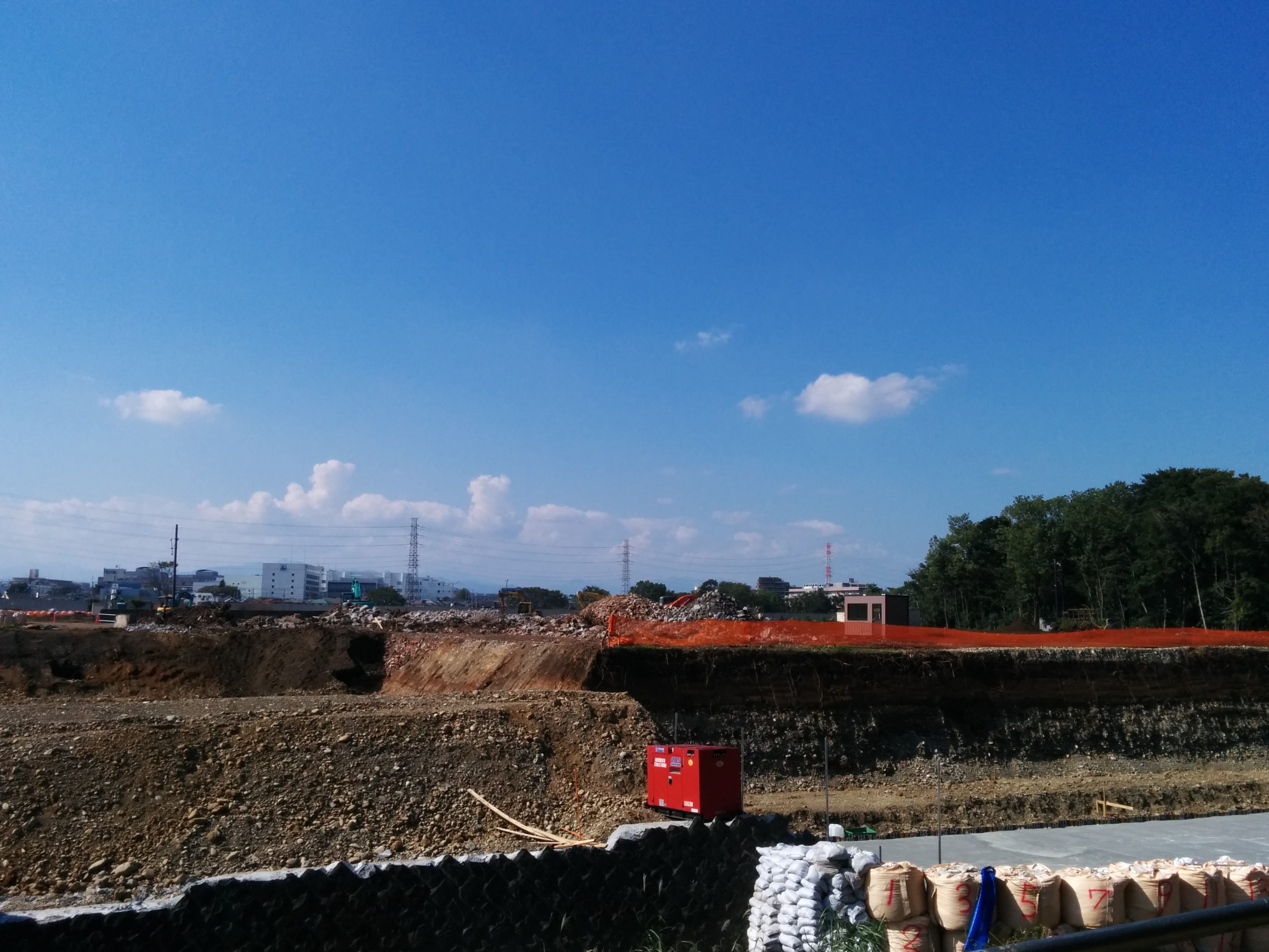 立川陸軍航空工廠跡の三本煙突跡